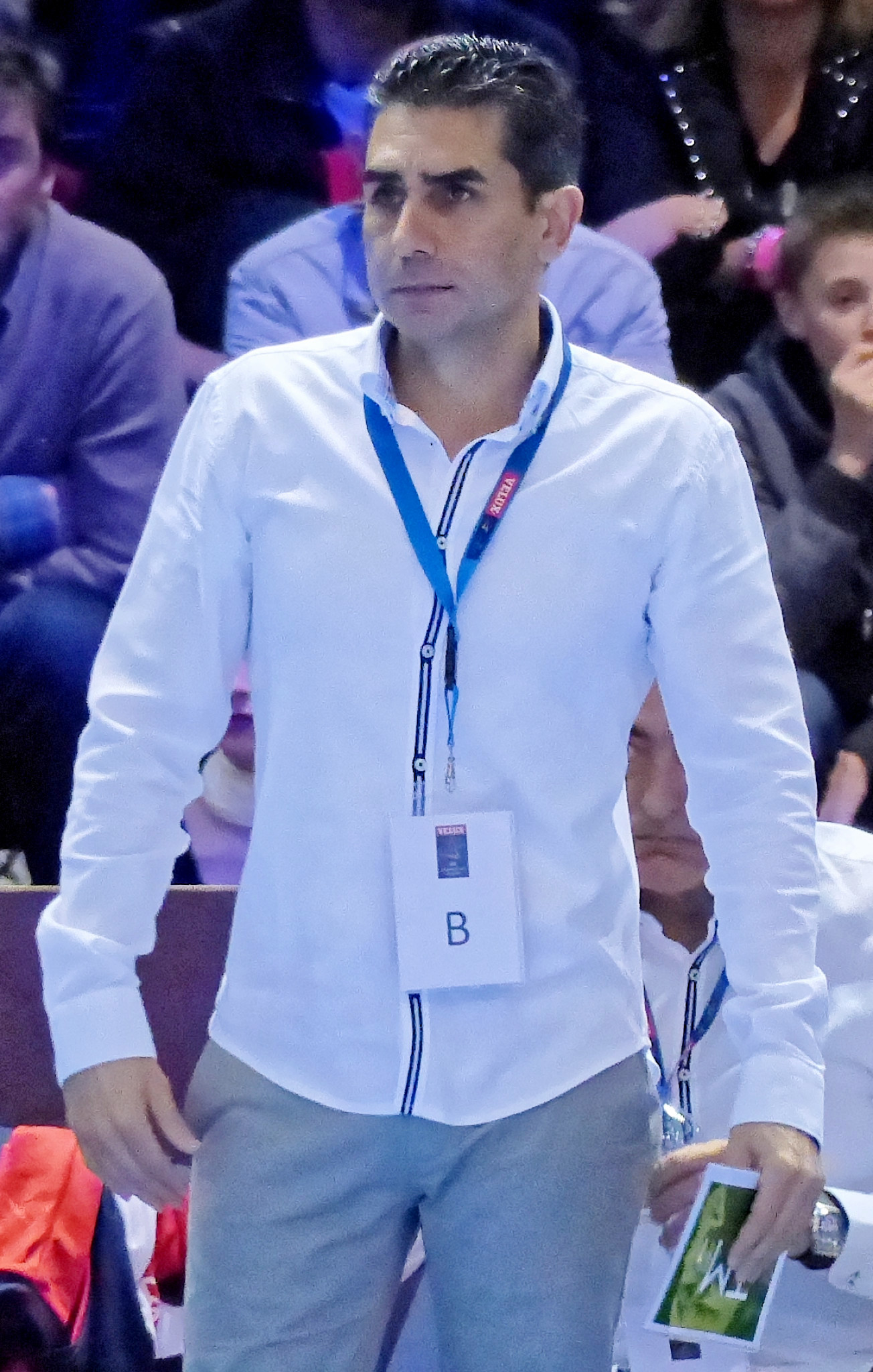 Rencontre de ligue des champions 2014-15 entre le PSG et le club espagnol Naturhouse La Rioja. A la Halle Carpentier (Paris), le 12 octobre 2014.